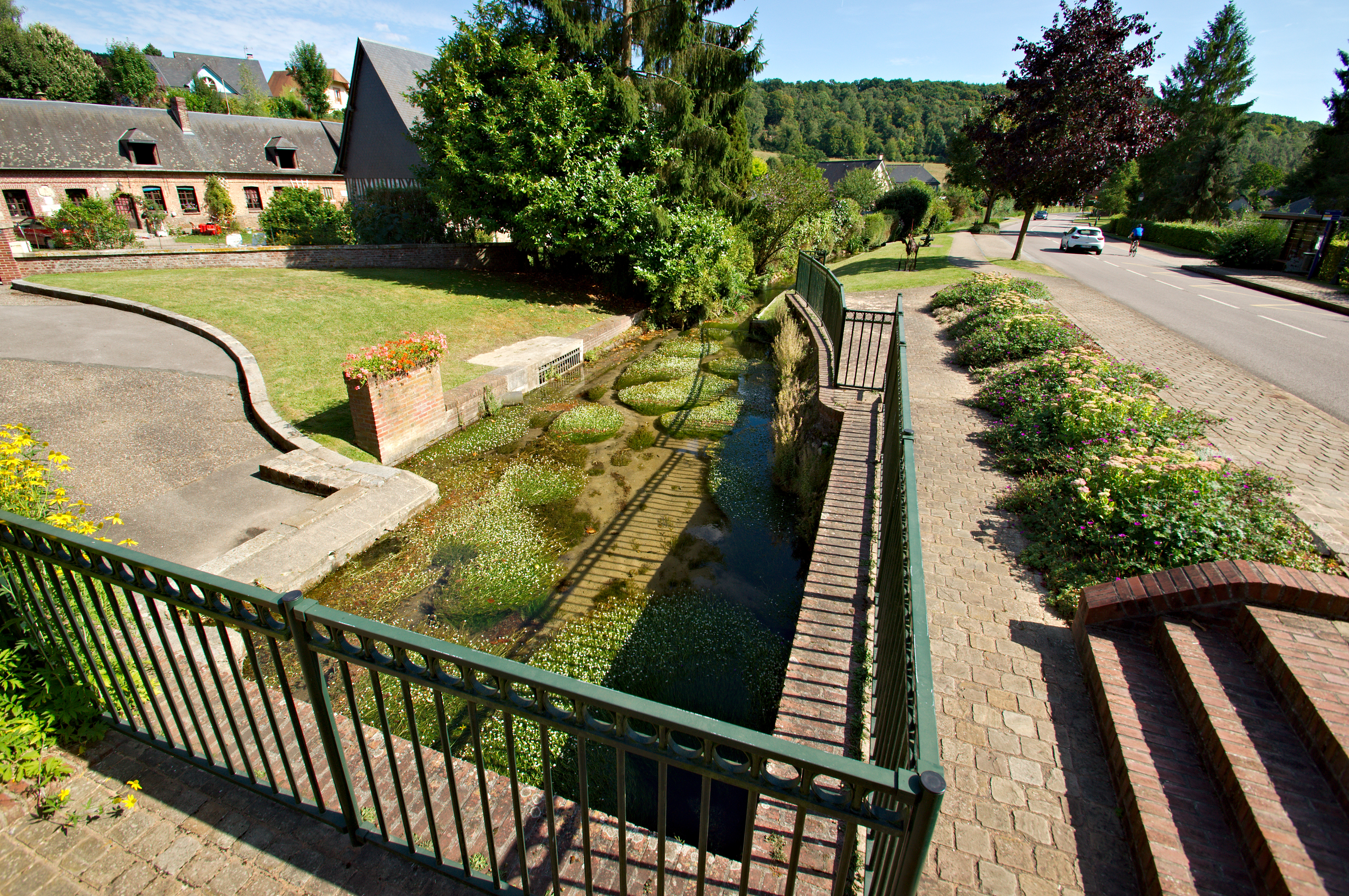 Le Robec à Fontaine-sous-Préaux, route des Sources